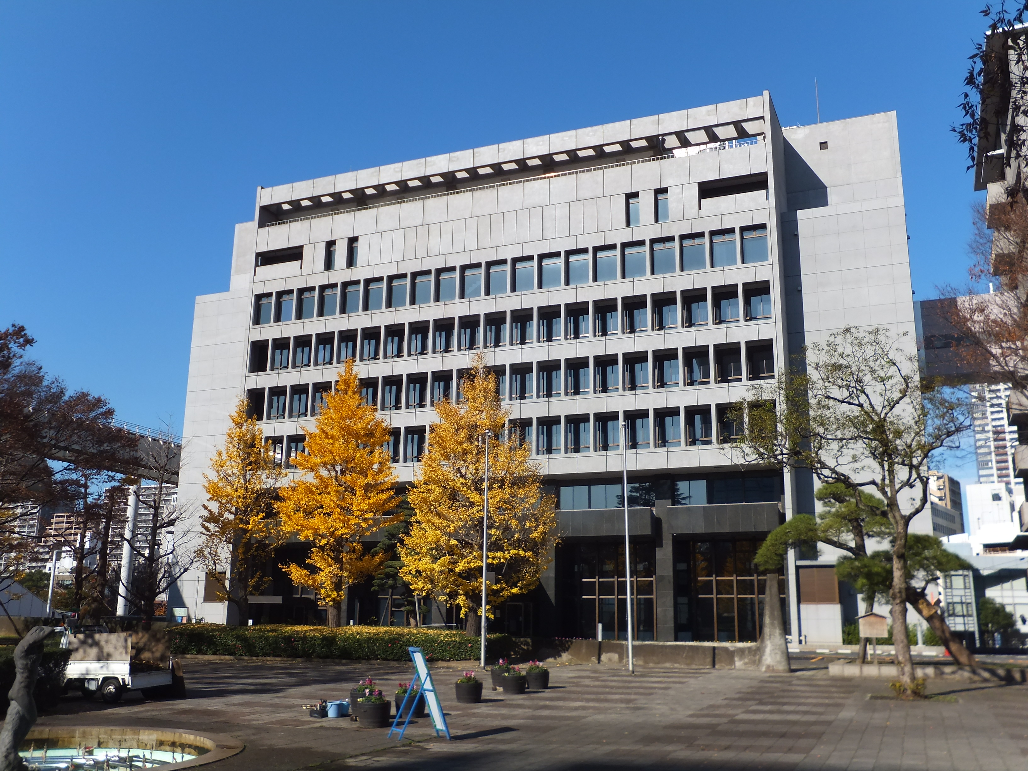 千葉県議会棟庁舎。千葉県庁本庁舎に隣接する。